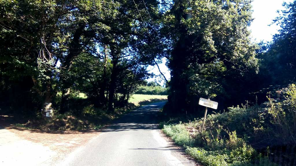 Vista de Mandeo, Curtis.